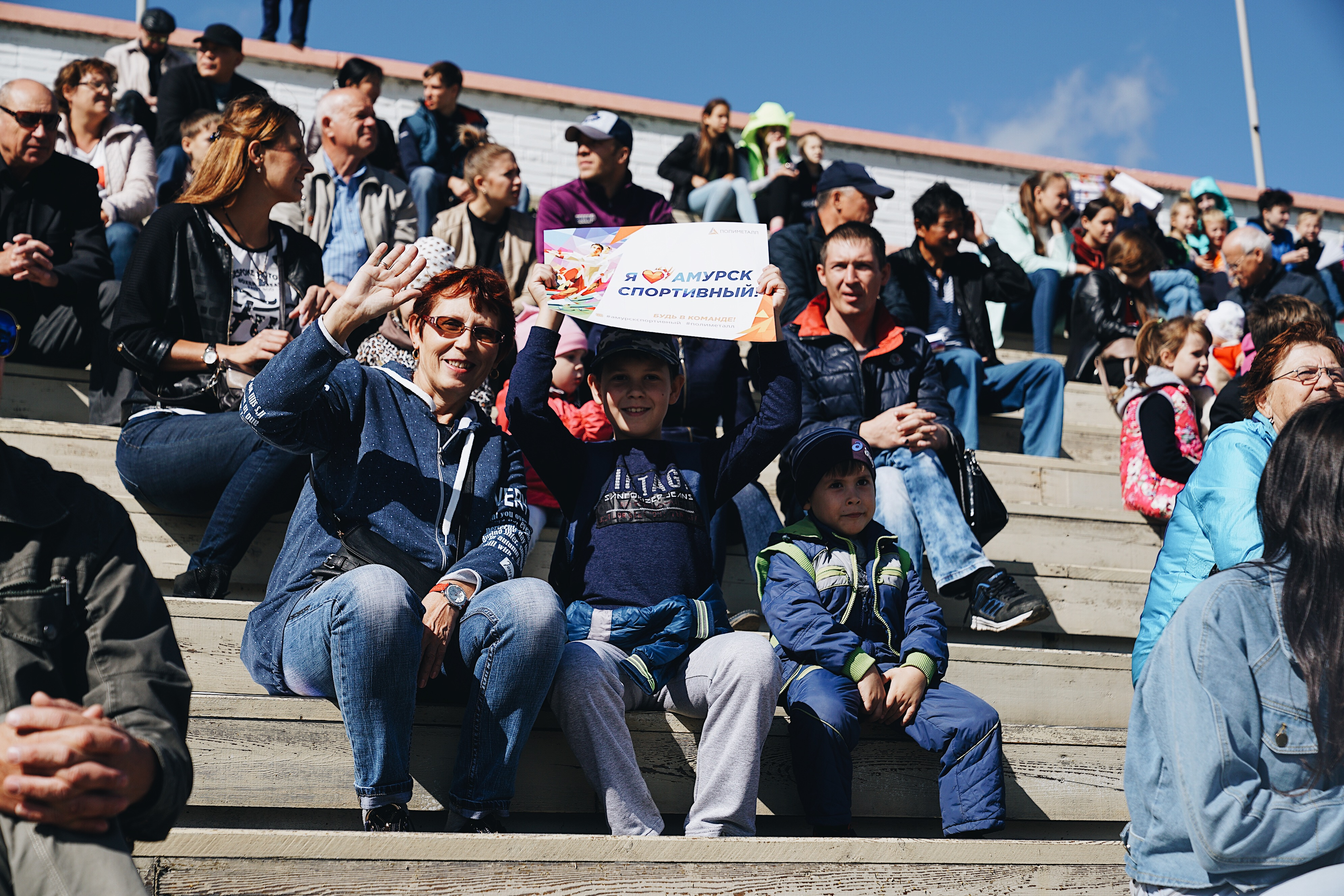 Болельщики во время спортивного фестиваля в Амурске